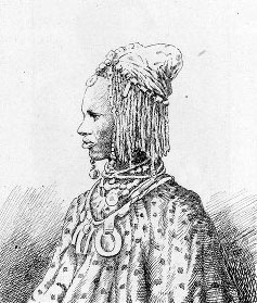 Vieille femme peulhe (illustration de Côte occidentale d'Afrique du Colonel Frey, fig. 29, p. 52)